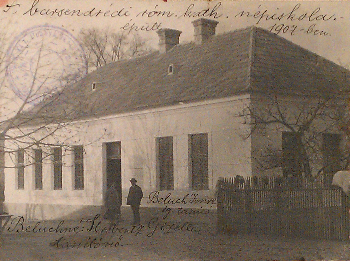 Barsendrédi iskola fényképe az iskolakrónikából (Lévai Barsi Múzeum